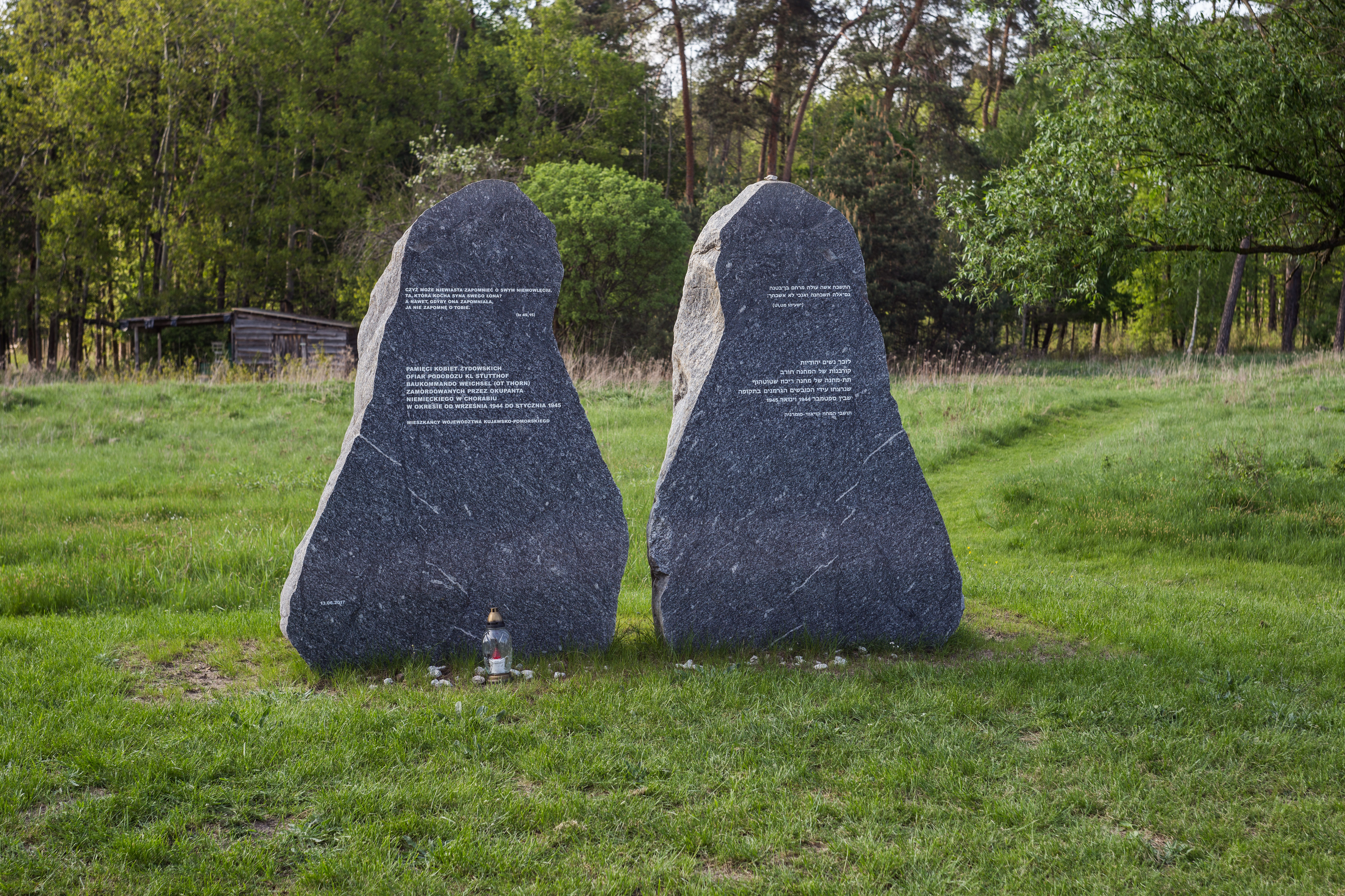 Pomnik pamięci Żydówek, zamordowanych w mieszczącej się tu pod koniec drugiej wojny światowej filii niemieckiego obozu koncentracyjnego Stutthof.